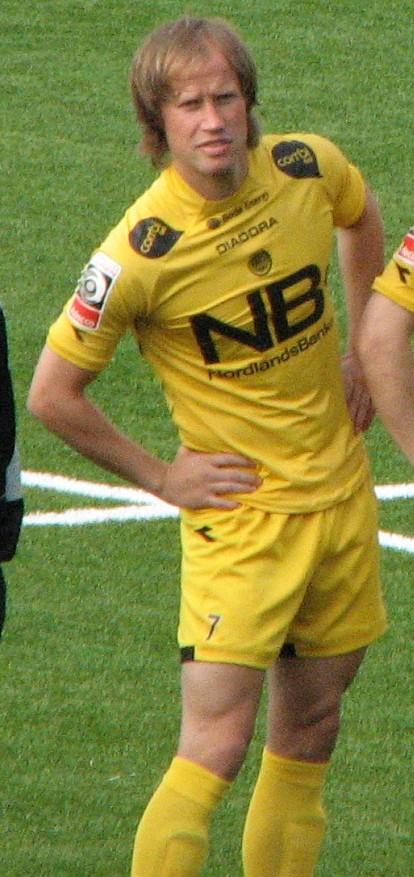 Runar Berg under oppstillingen til BOdø/Glimt-Sogndal